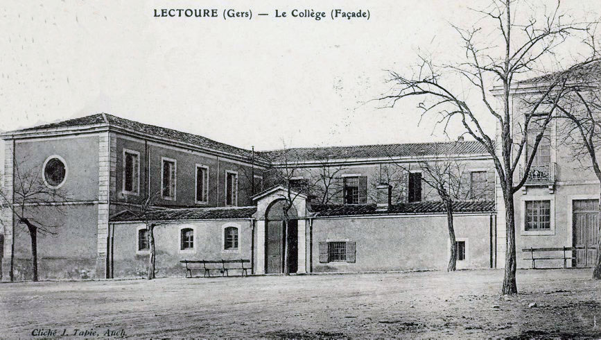 Lectoure, Gers, Occitanie, France. Ancien collège, construit en 1772, état au début du XXe siècle. Carte postale ancienne, photo J. Tapie, Auch.